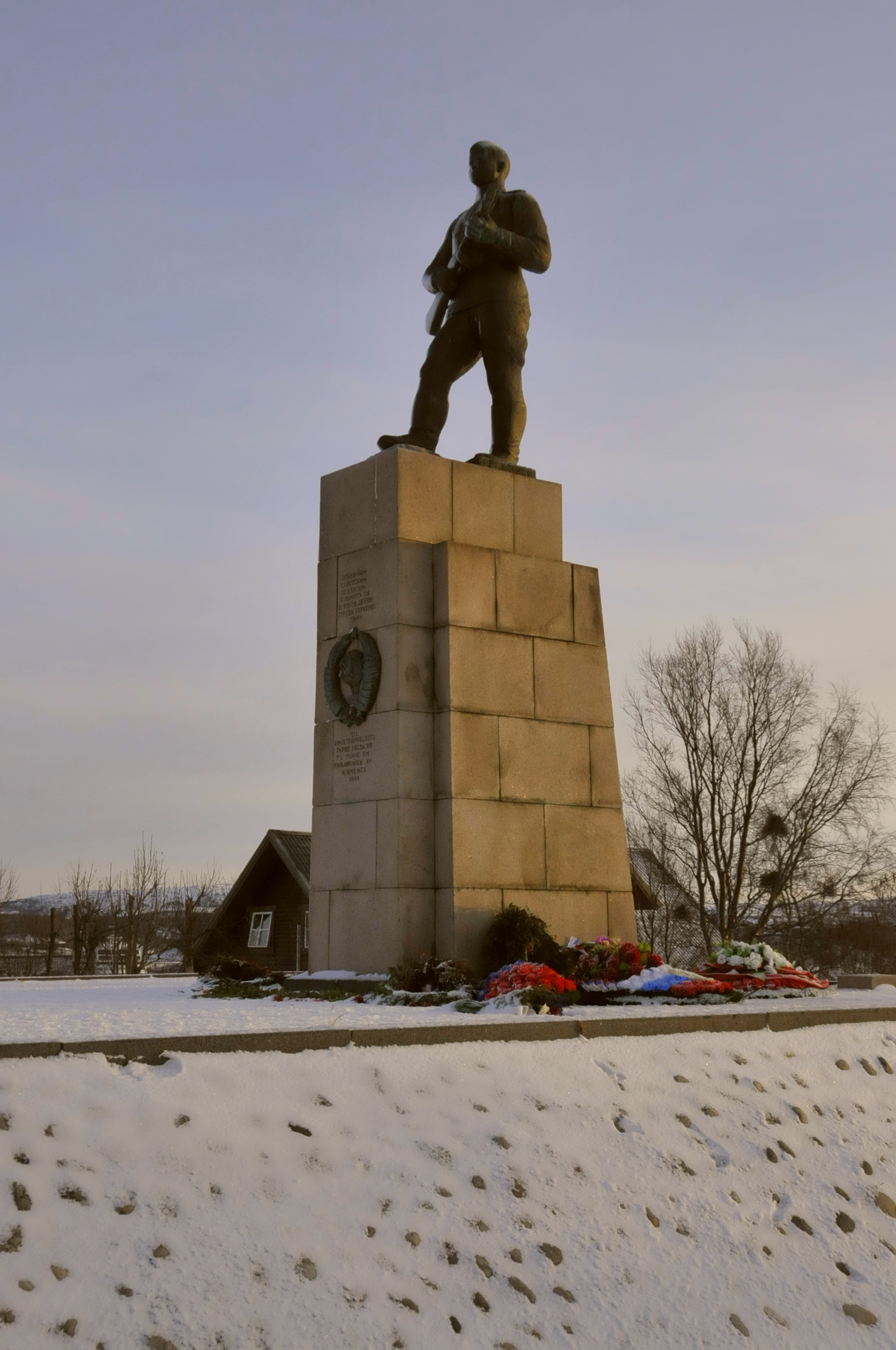 "Russendenkmal" in Kirkenes